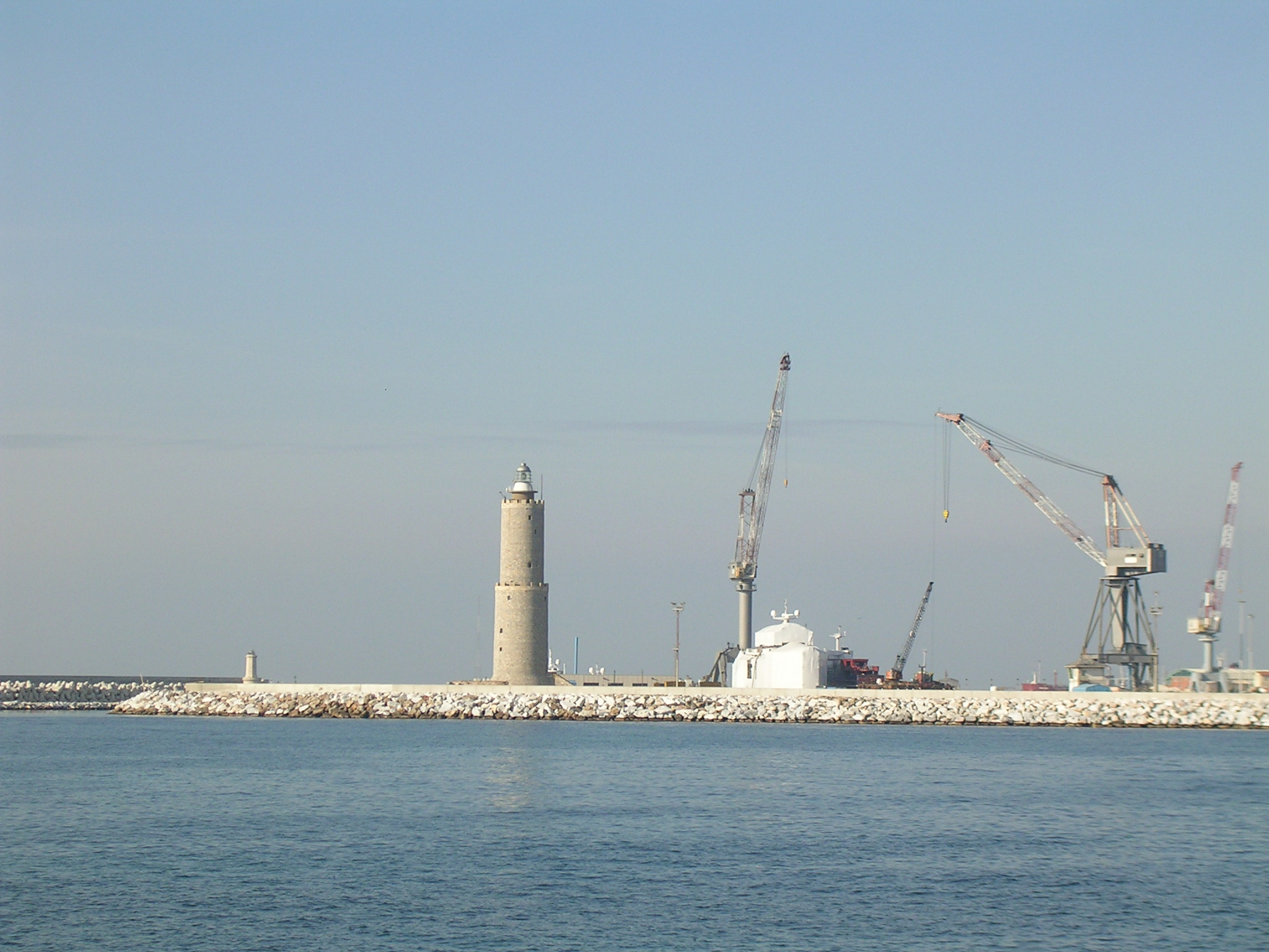 Livorno: il Fanale del porto di Livorno. Risale al Trecento e, distrutto dai tedeschi in ritirata durante l'ultima guerra mondiale, fu ricostruito impiegando il materiale recuperato tra le macerie. Supera i 50 metri di altezza.